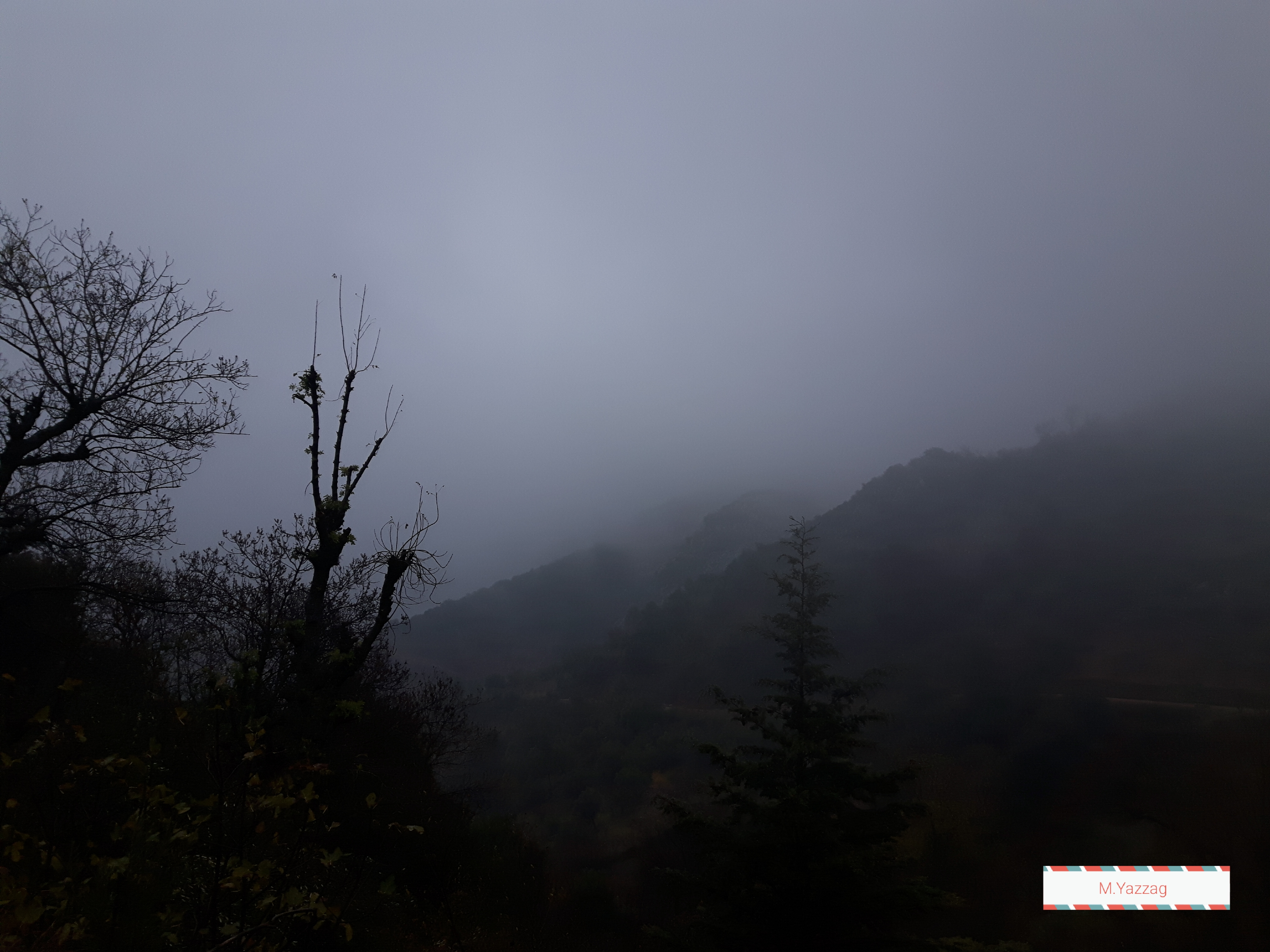 Vue sur une partie de la montagne en hiver